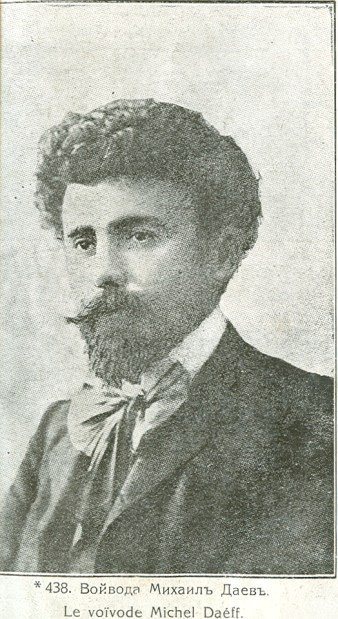 "Македония в образи", София, 1919.